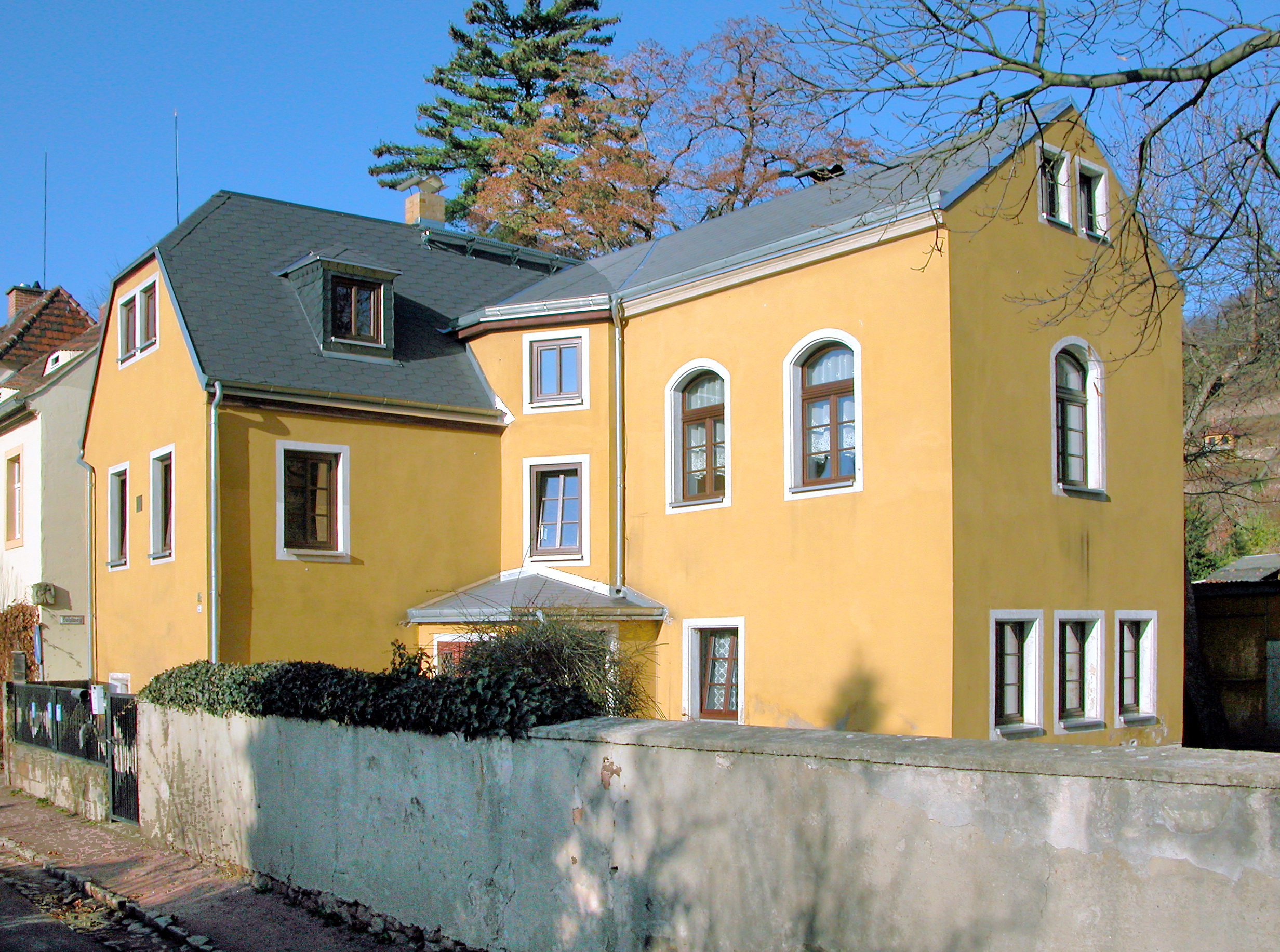 18.11.2009 01445 Radebeul-Oberlößnitz: Weingut Haus Friedeborn, Weinbergstraße 36 / Ecke Hohlweg. [DSCN40197.TIF]20091118105DR.JPG(c)Blobelt